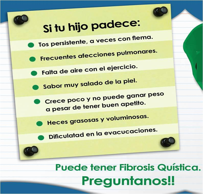 Si tiene los siguientes síntomas, existe la probabilidad que la persona tenga Fibrosis Quística